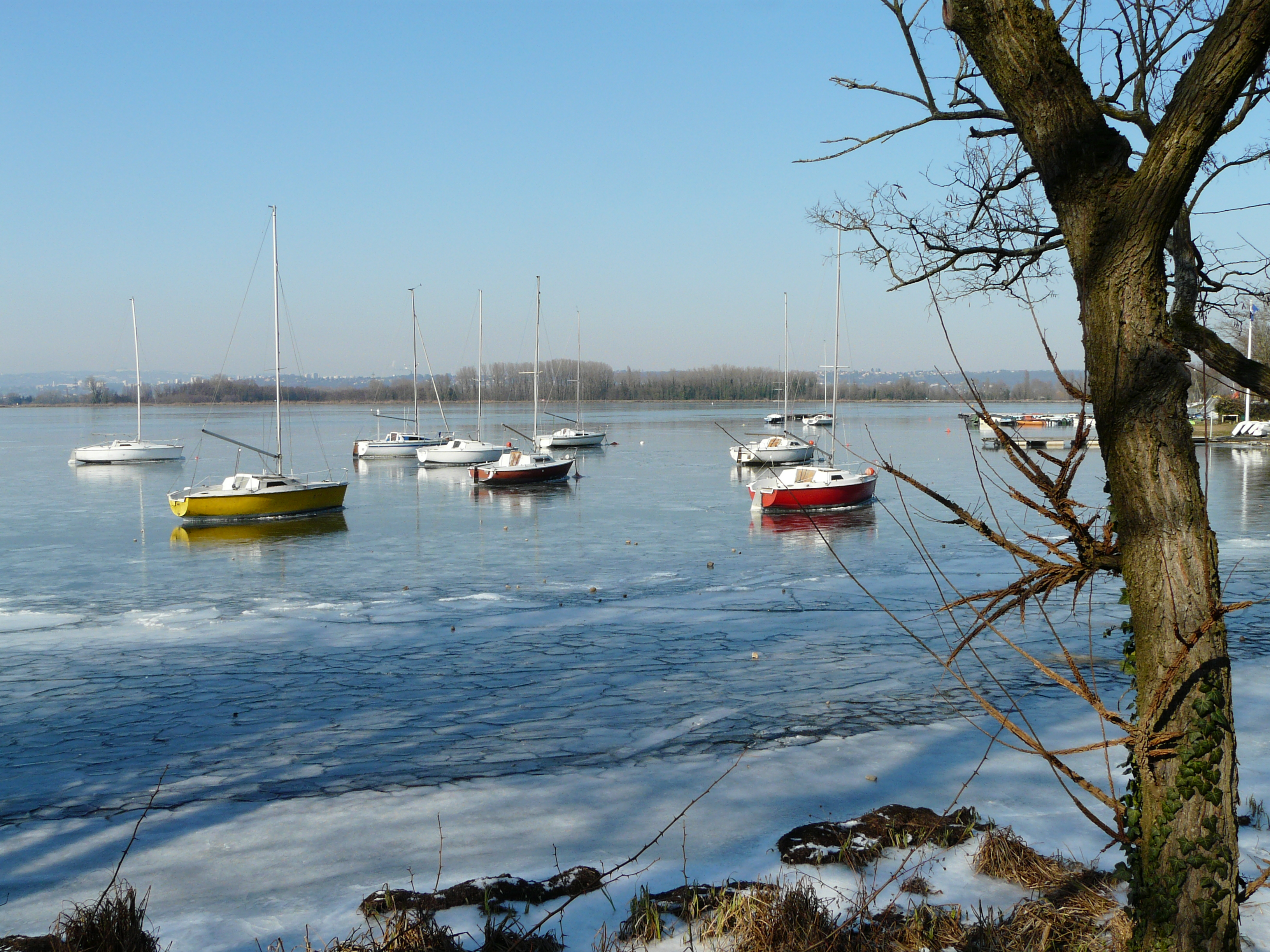 Plan d'eau du Grand Large à Décines-Charpieu (club de voile) sur le canal de Jonage